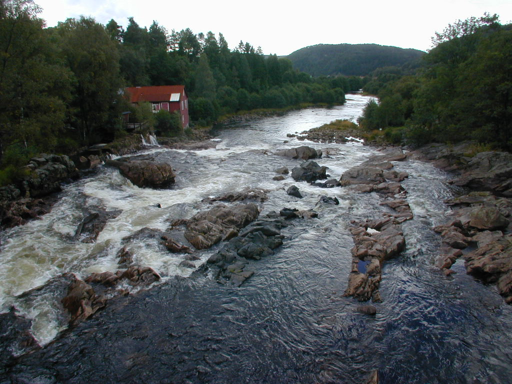 Melhusfossen i elva Audna i Lindesnes kommune.